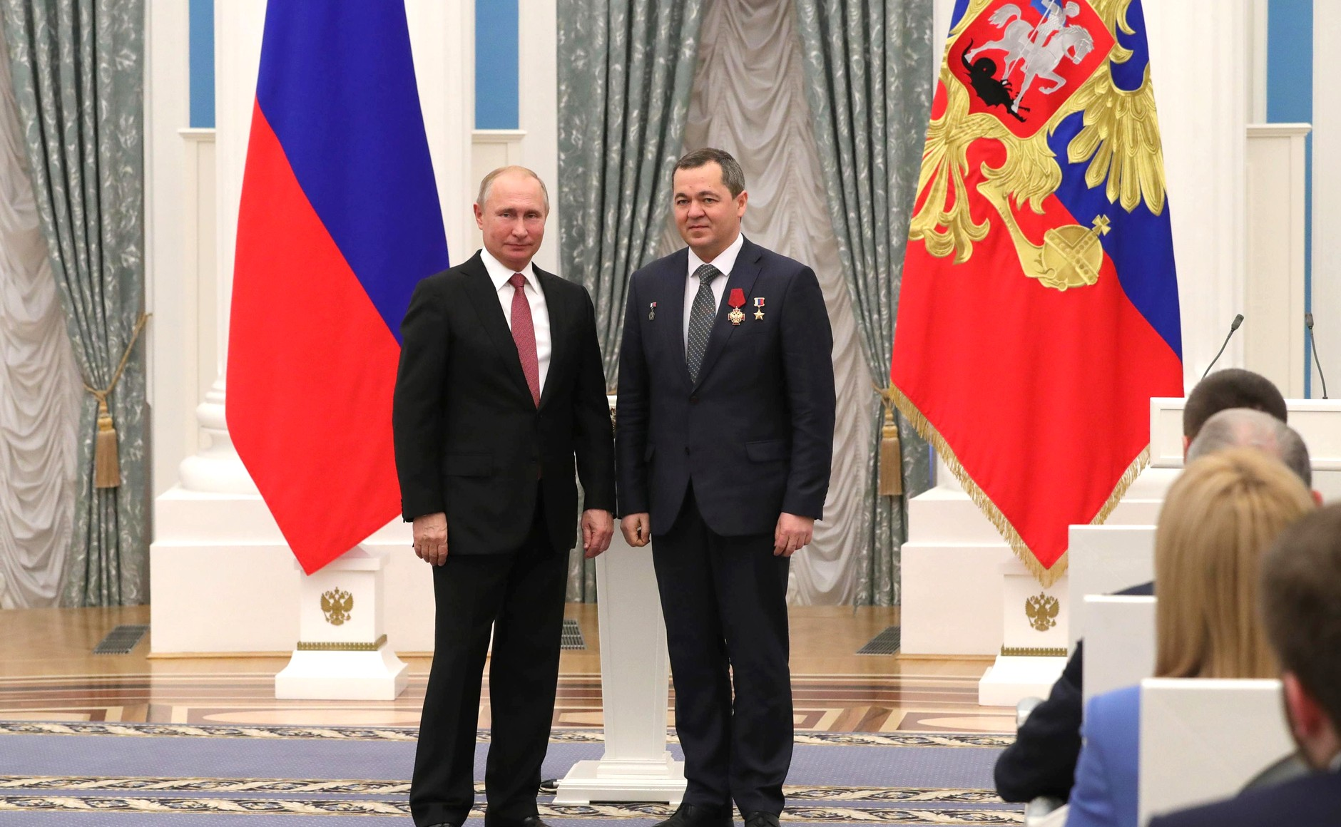 Вручение государственных наград. Орденом «За заслуги перед Отечеством» IV степени награждён инструктор-космонавт-испытатель отряда космонавтов Научно-исследовательского испытательного центра подготовки космонавтов имени Ю. А. Гагарина Олег Скрипочка.